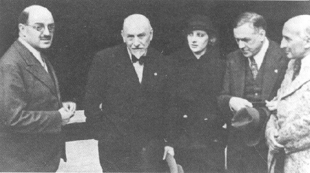 A Firenze, nel chiostro di Santa Croce con d’Amico, Andreina Pagnani, Renato Simonie Jacques Copeau, regista dello spettacolo Santa Uliva.